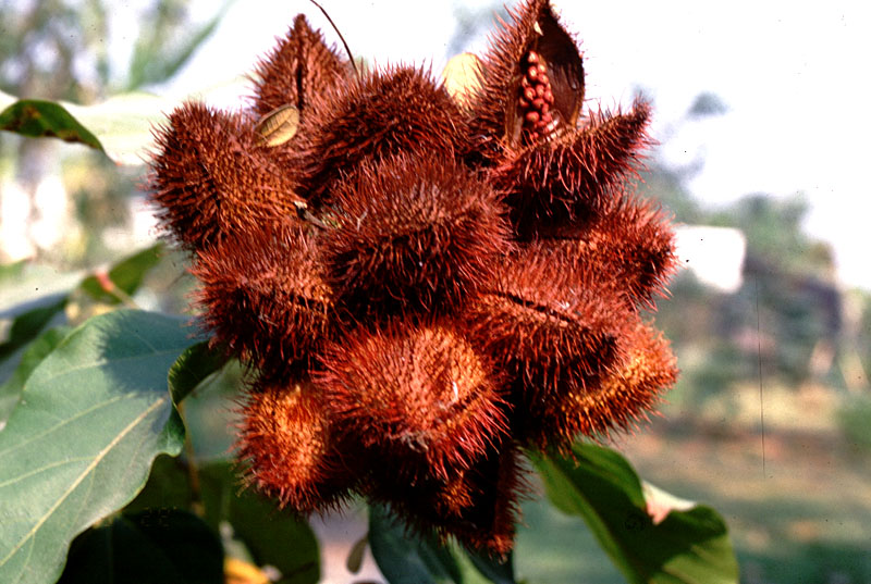 Аннато2